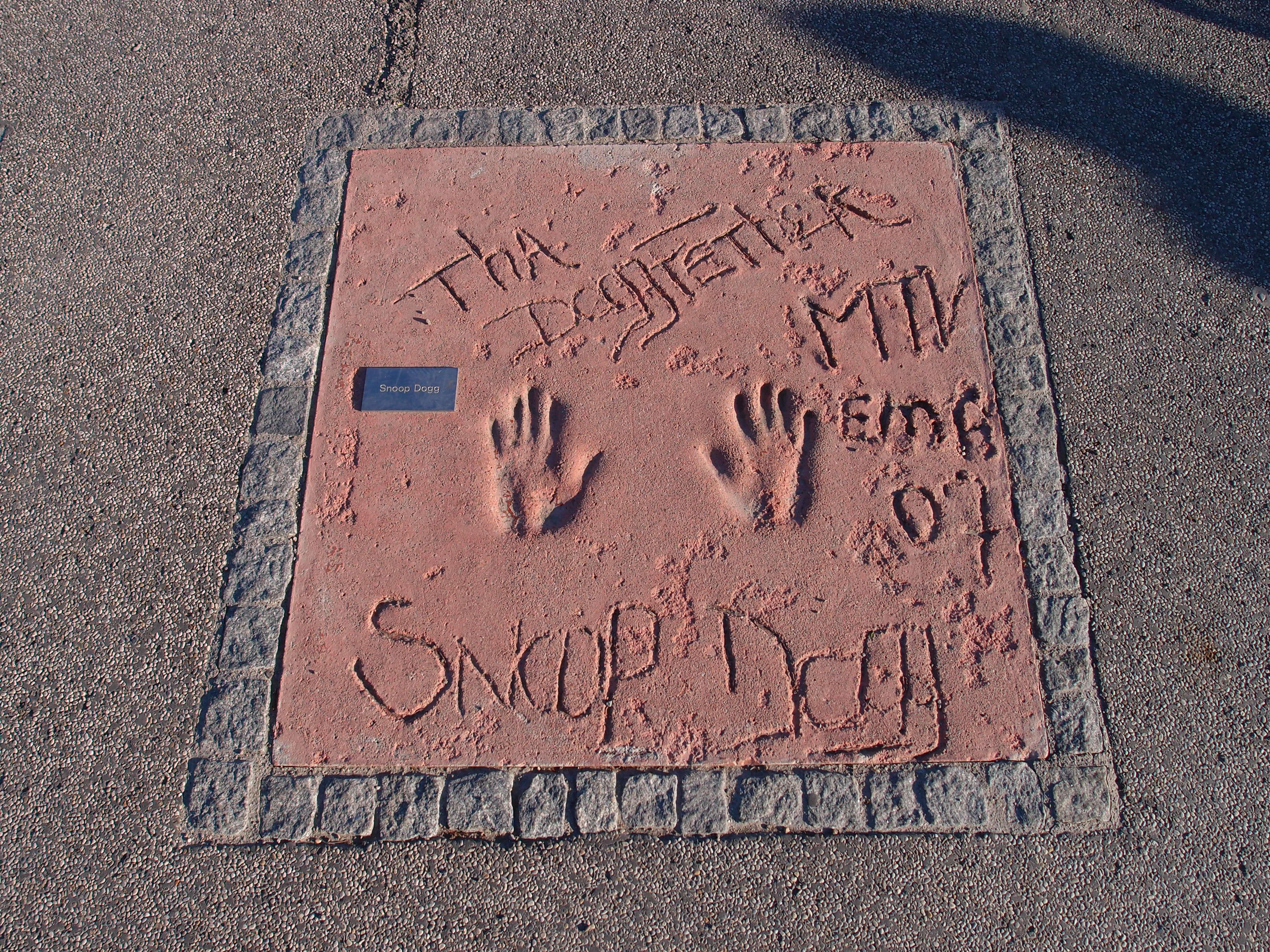 Snoop Dogg (Handabdrücke); Munich Olympic Walk of Stars, München, Olympiapark